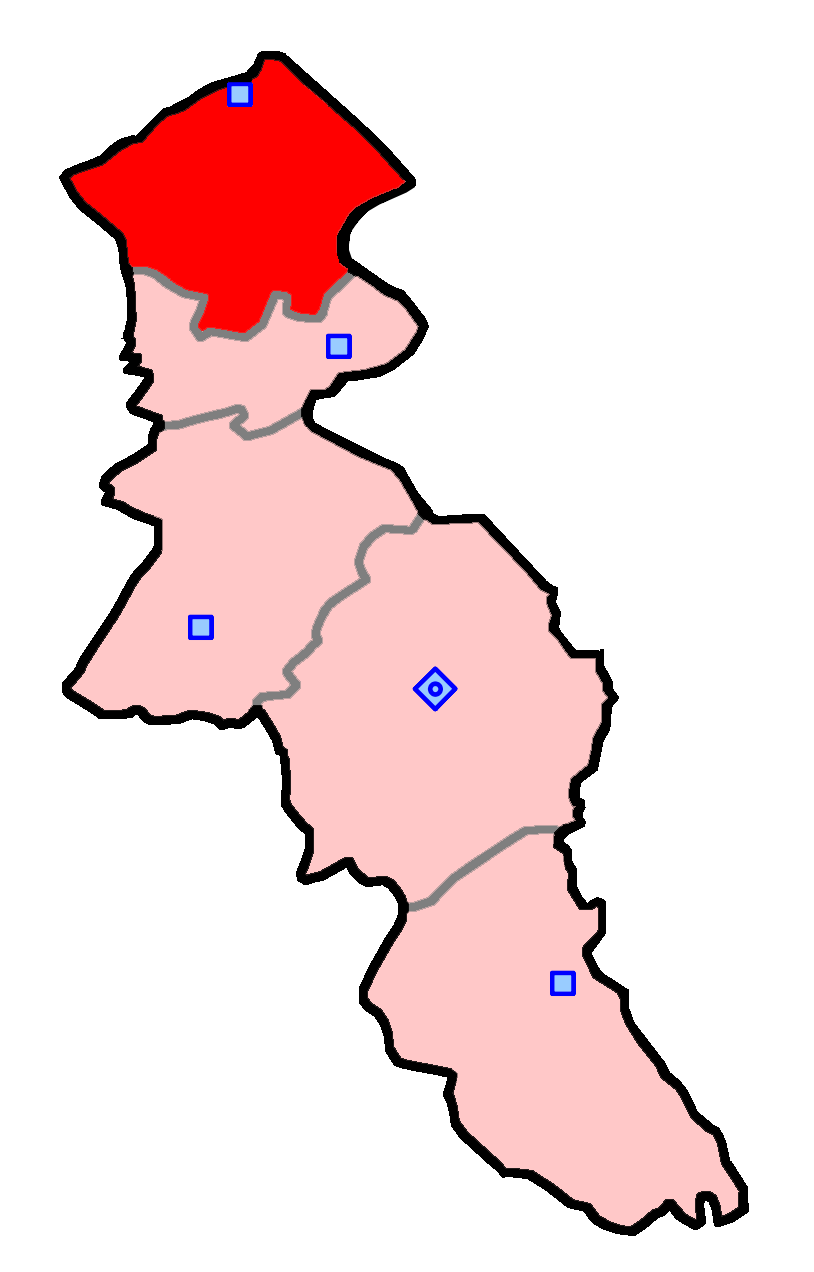 حوزهٔ انتخاباتی پارس‌آباد و بیله‌سوار برای انتخابات مجلس شورای اسلامی